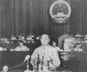 1957年7月1日，第一届全国人民代表大会第四次会议在北京举行。国务院副总理兼国家经济委员会主任薄一波在会上作《关于1956年度国民经济计划执行结果和1957年度国民经济计划草案的报告》